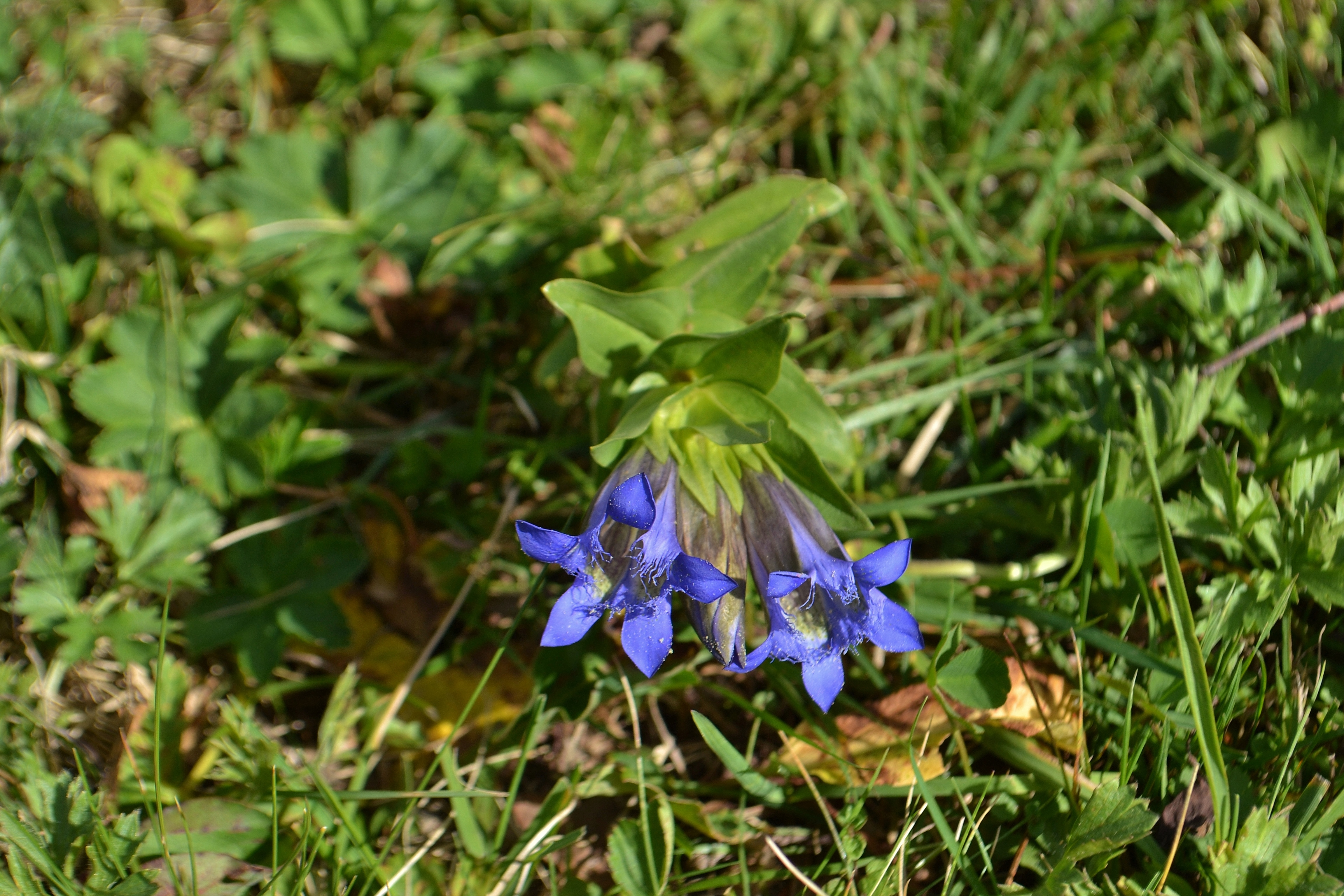 Gentiana septemfida Горечавка семираздельная . Авадхара. Абхазия.